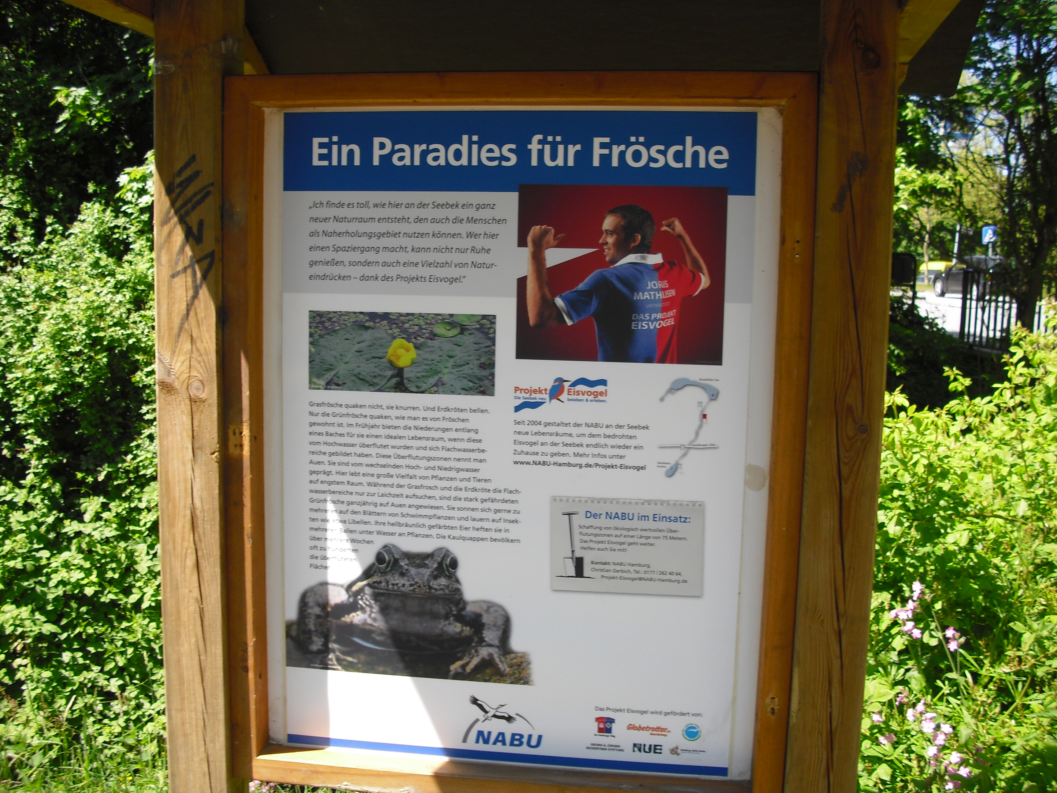 Informationstafel des NABU an der Seebek